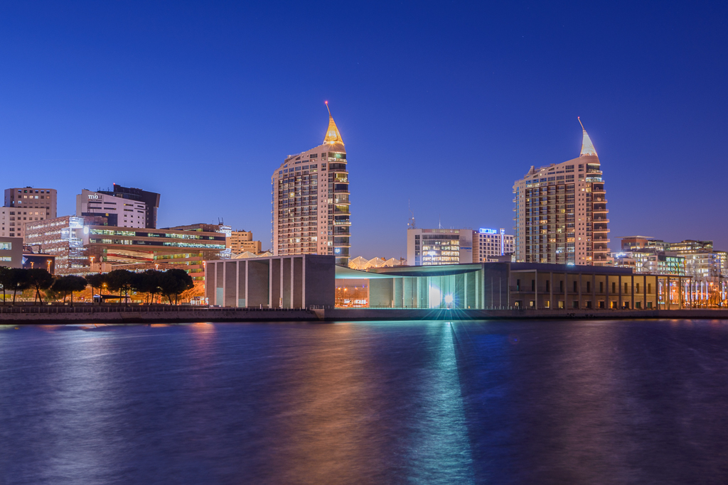 Lisbon - Expo #3